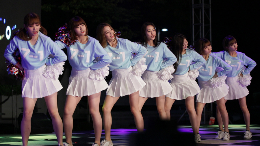 칠학년일반(7학년1반) 신안산대학교 축제